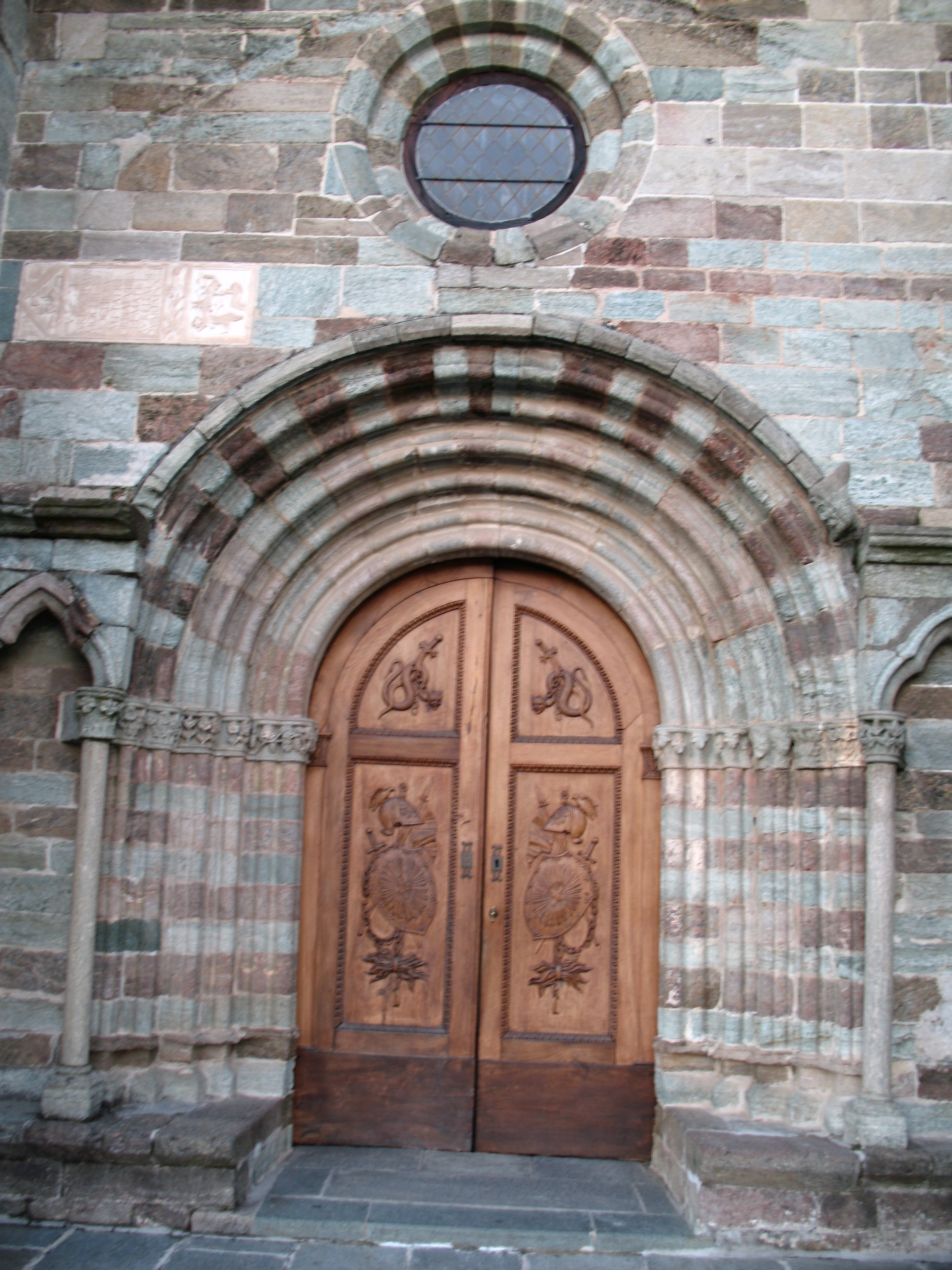 Sacra di San Michele, portico chiesa - Valle di Susa